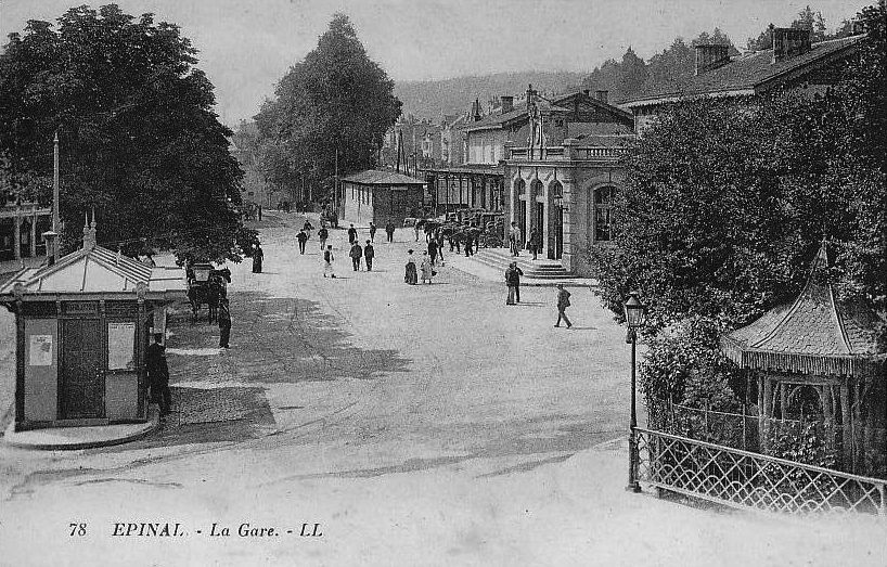 La place de la gare et le bâtiment voyageurs à Épinal au début des années 1900.